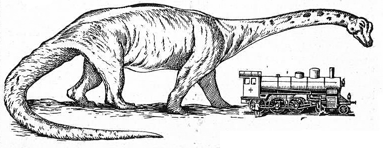 "Gigantosaurus" (=Tornieria) compared to a locomotive